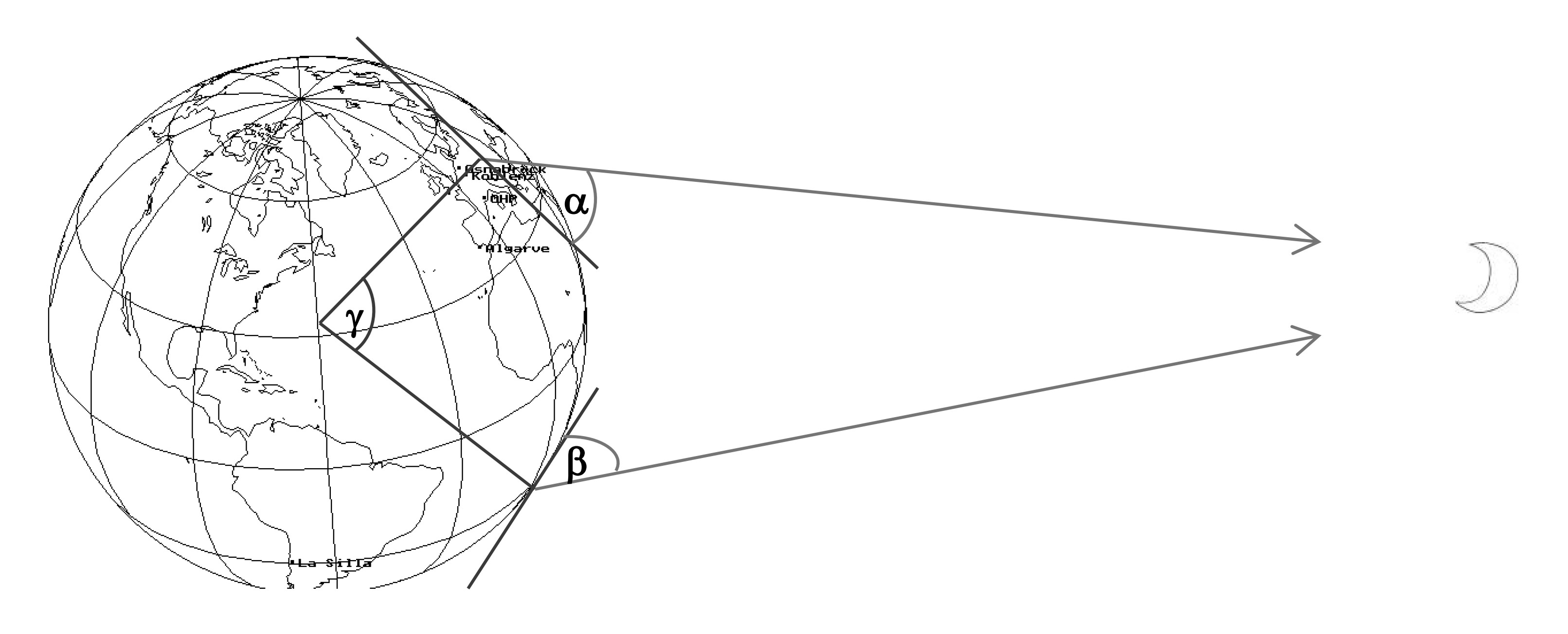 Messung der Mondentfernung nach Lalande und Lacaille, siehe Der Mond und seine Bewegung; aus einem Lehrstückentwurf der Lehrkunstdidaktik